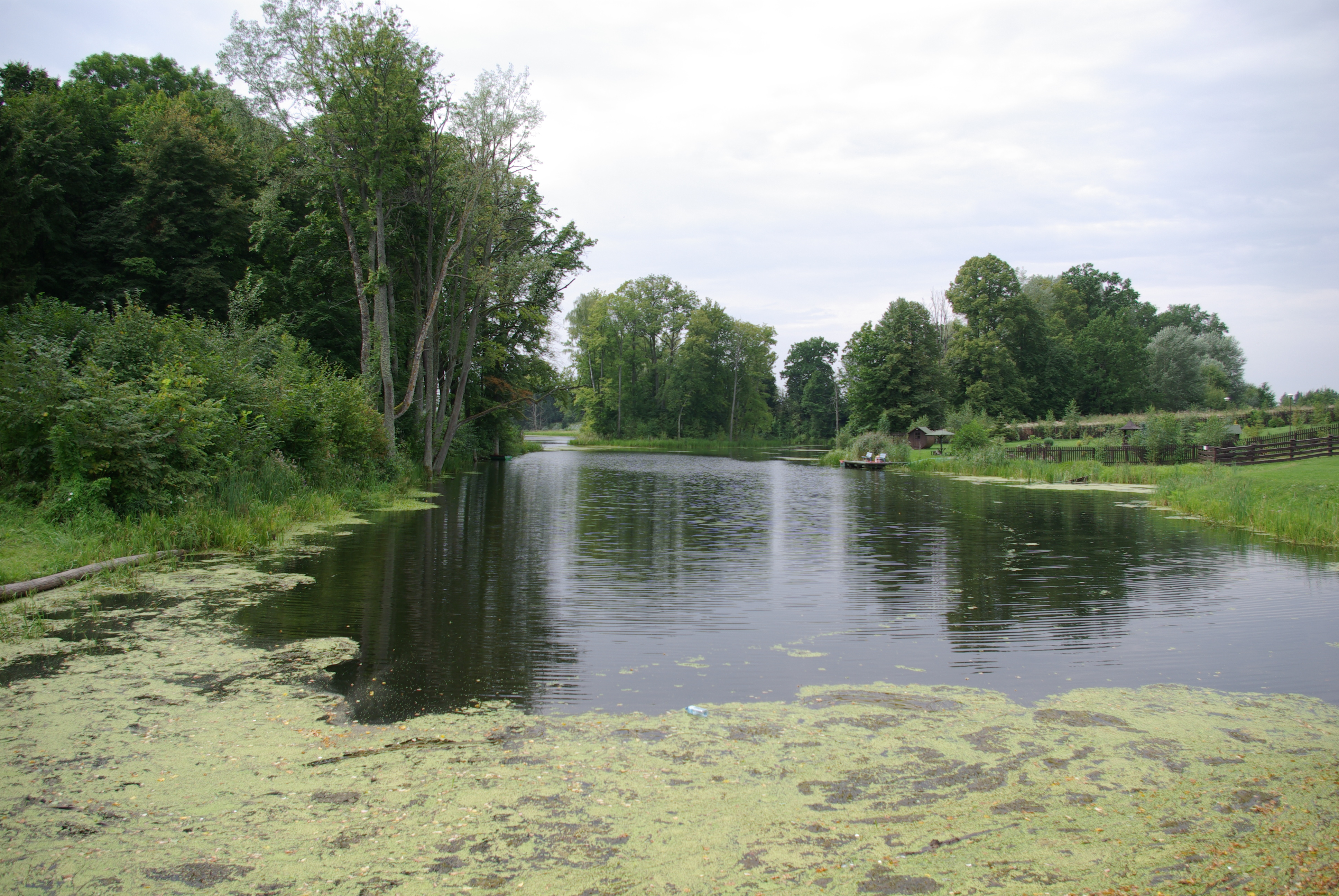 Ołownik